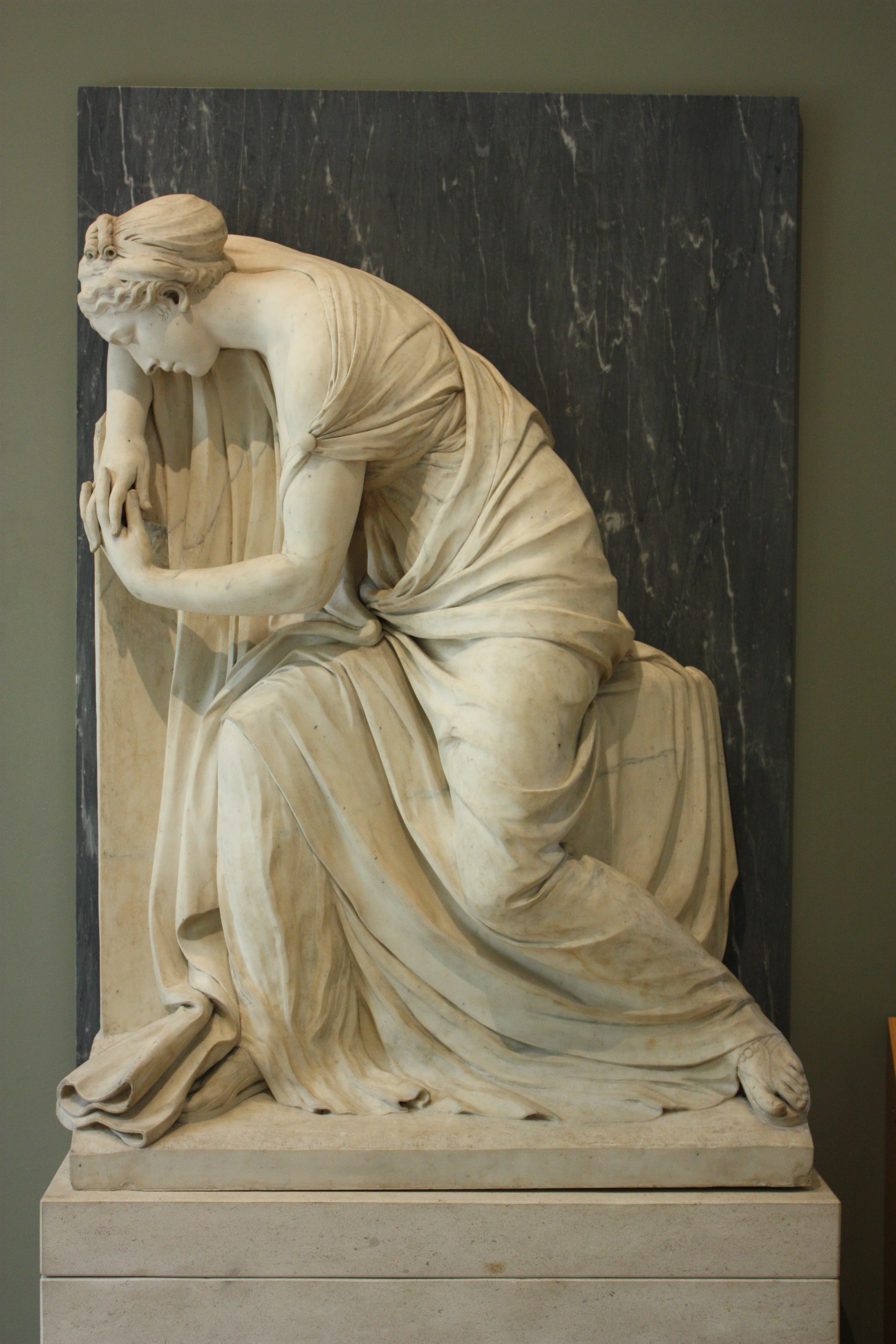 La Douleur